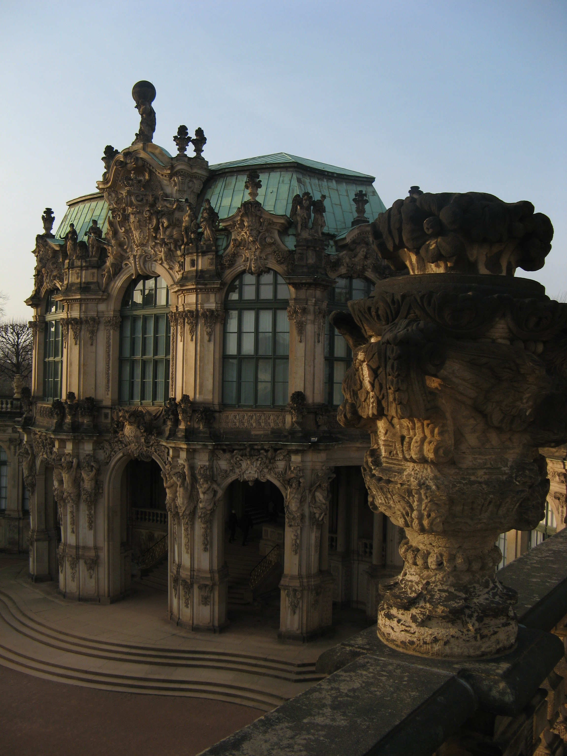 Wallpavillon